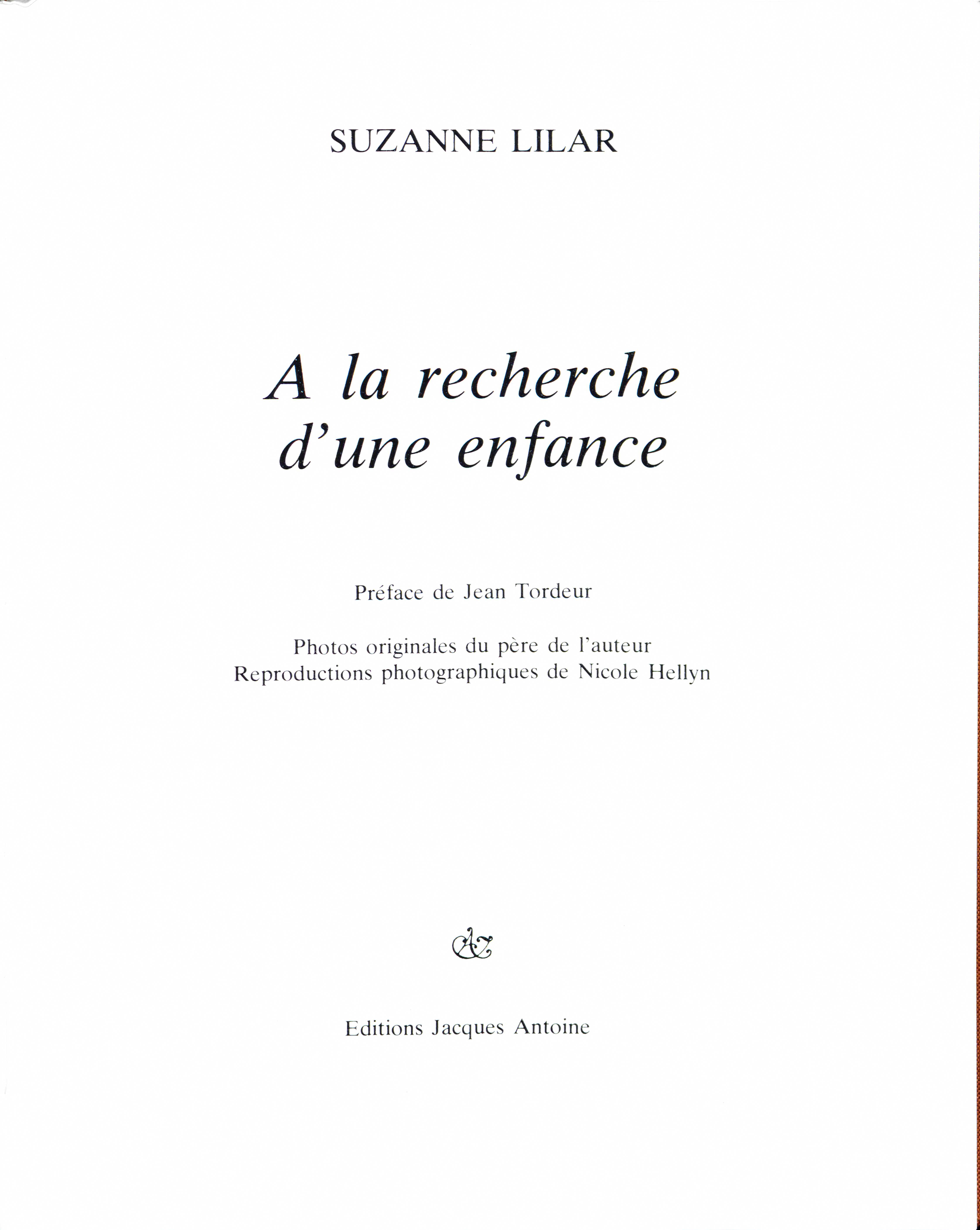 Suzanne Lilar A la recherche d'une enfance. Bruxelles : Éditions Jacques Antoine, 1979 Title